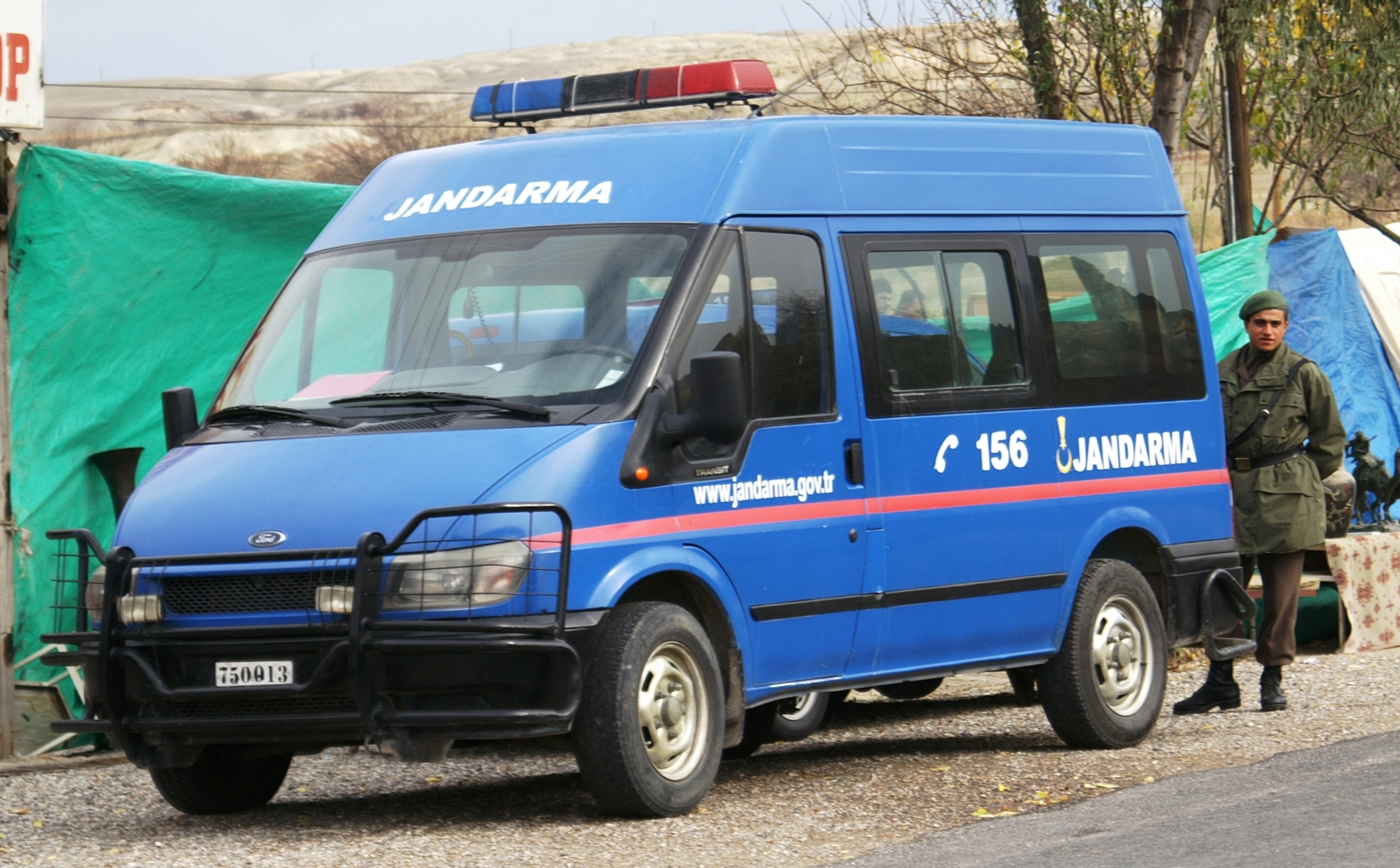 Turkse Gendarmerie